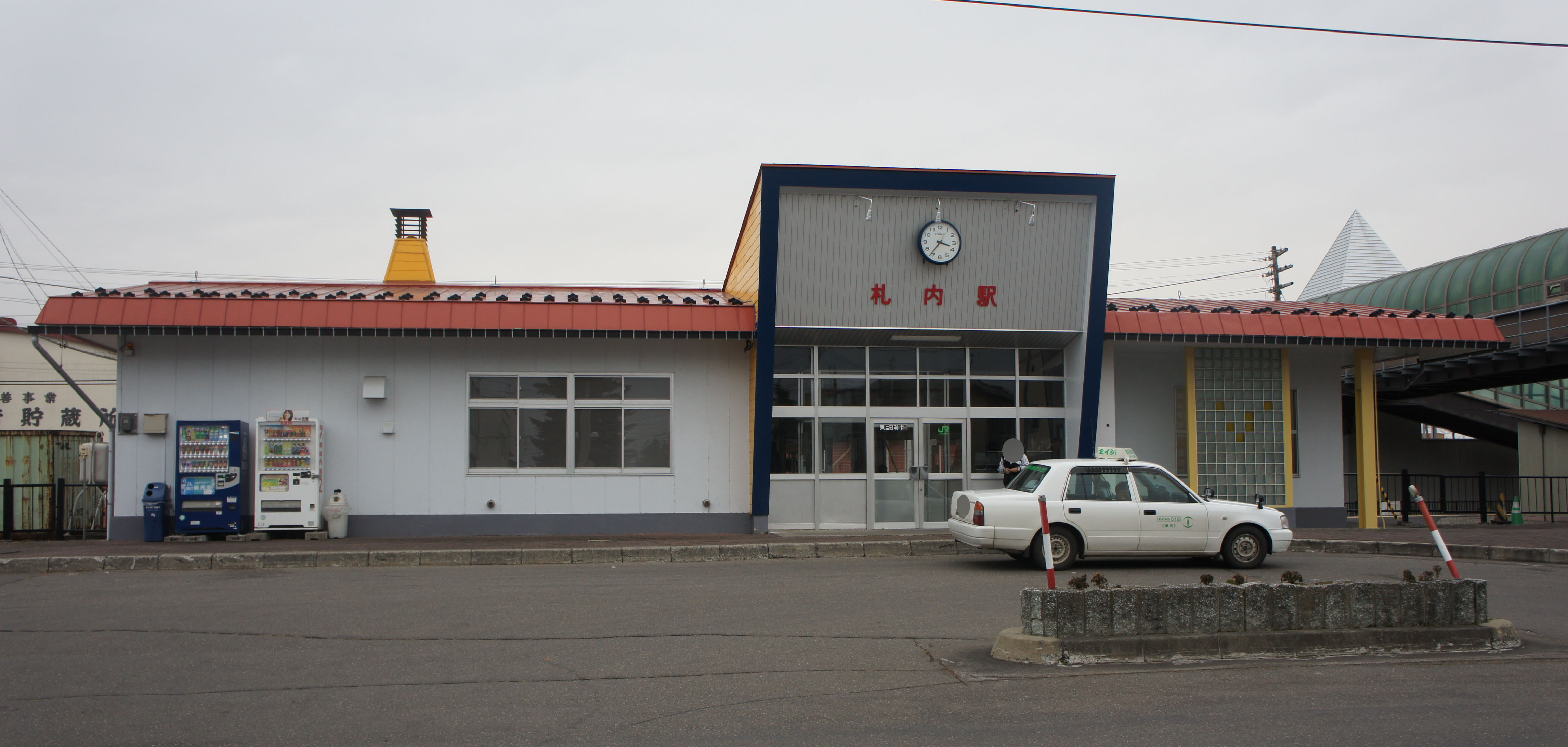 JR根室本線・札内駅の駅舎 Sony NEX-3